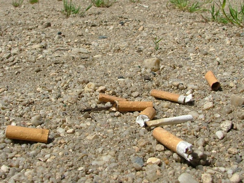 Cigarettes, papierosy